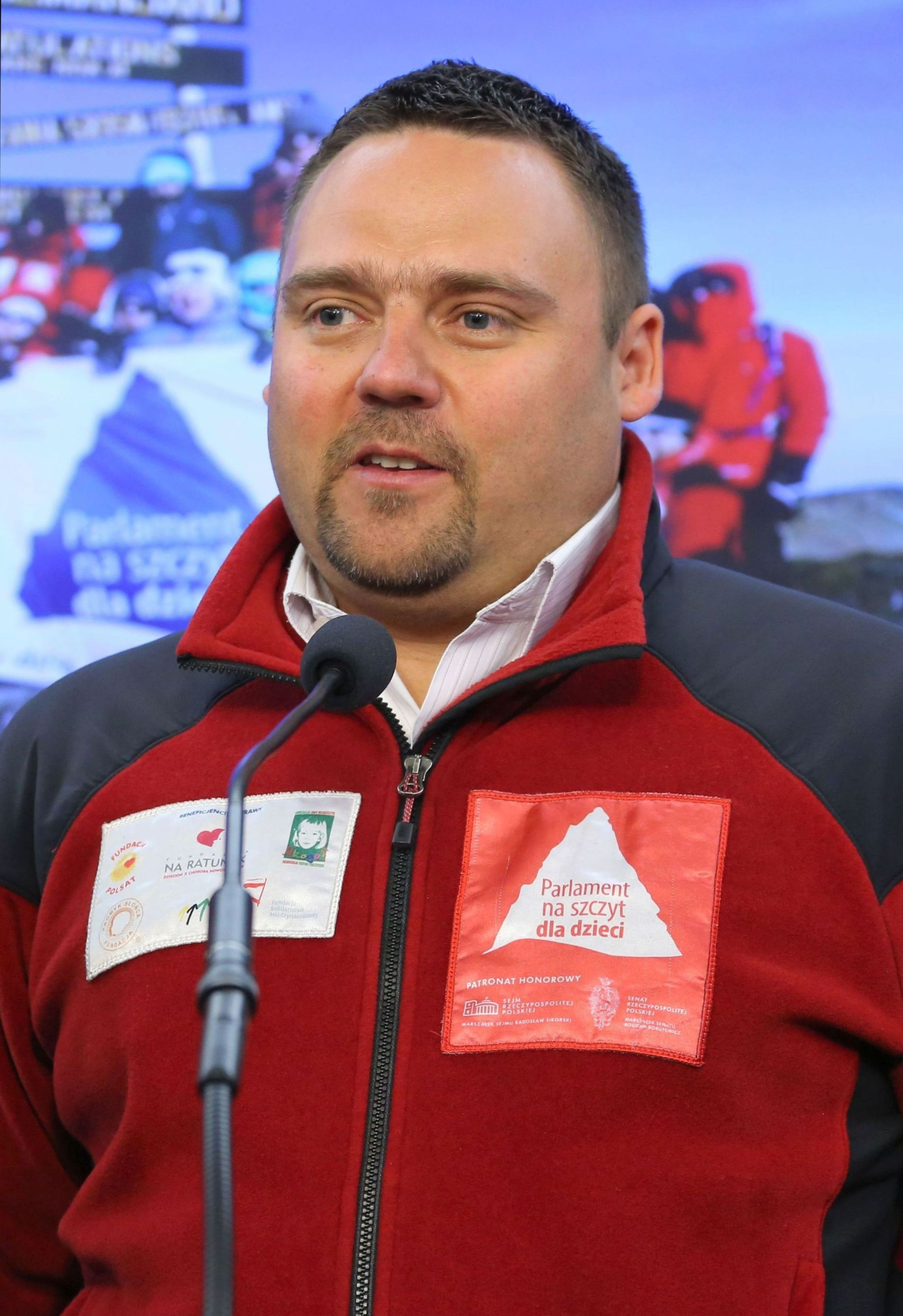 Poseł Adam Kepiński podczas konferencji prasowej poświęconej projektowi "Wyprawa na szczyt dla dzieci" w Sejmie